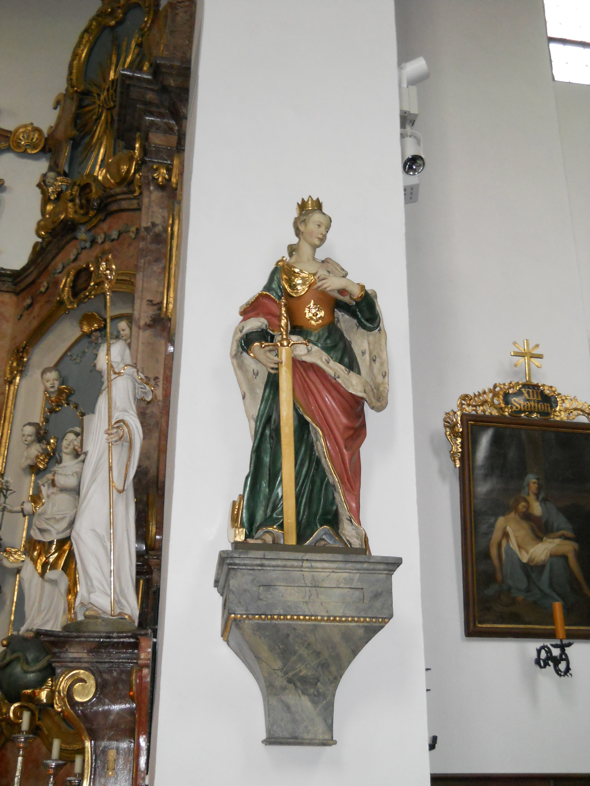 Kirchehrenbach in der Fränkischen Schweiz, Kath. Pfarrkirche St. Bartholomäus, Barockstatue der hl. Katharina von Alexandrien